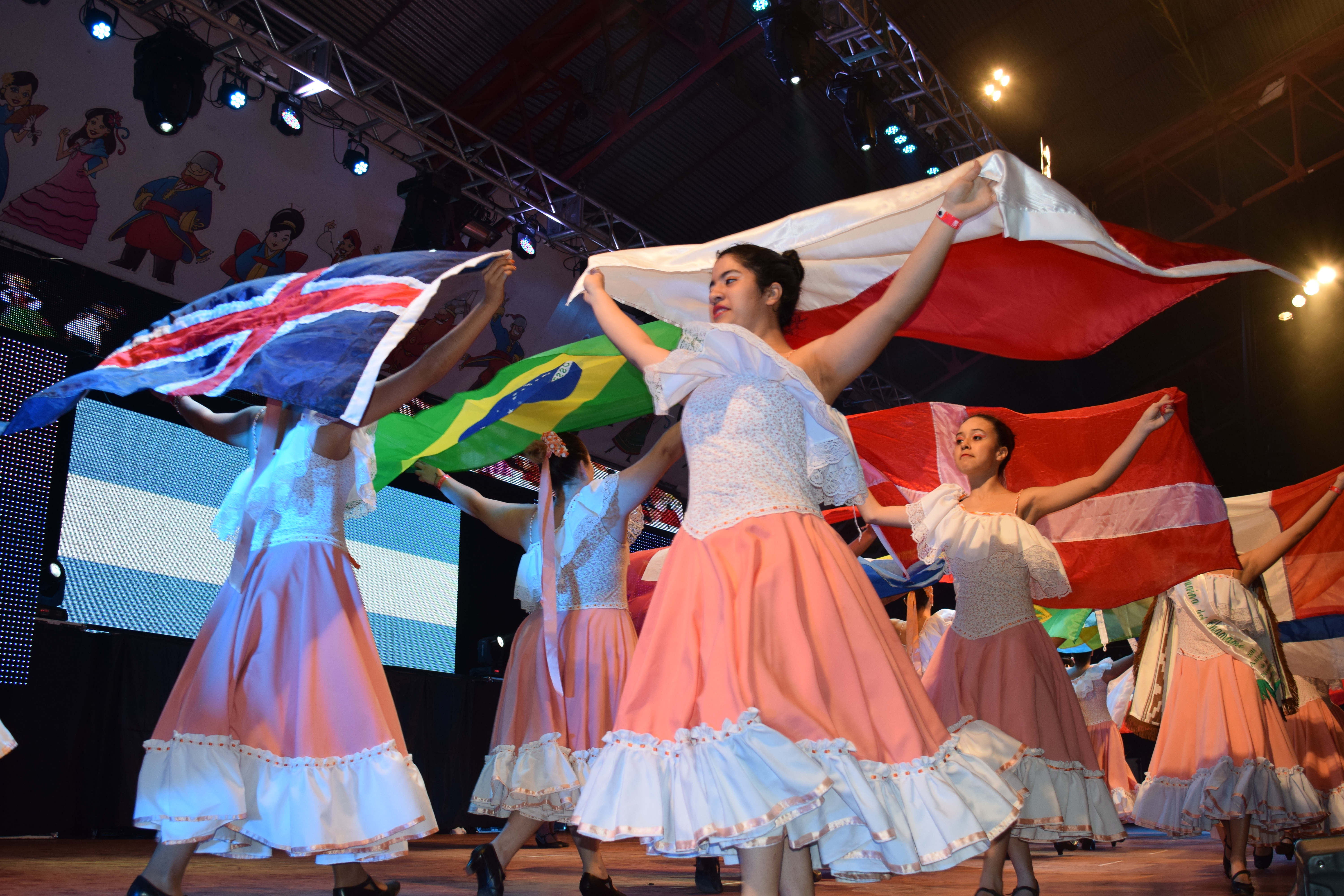 Cuadro de apertura durante la XXXV Fiesta Nacional del Inmigrante en Oberá, Misiones, Argentina.